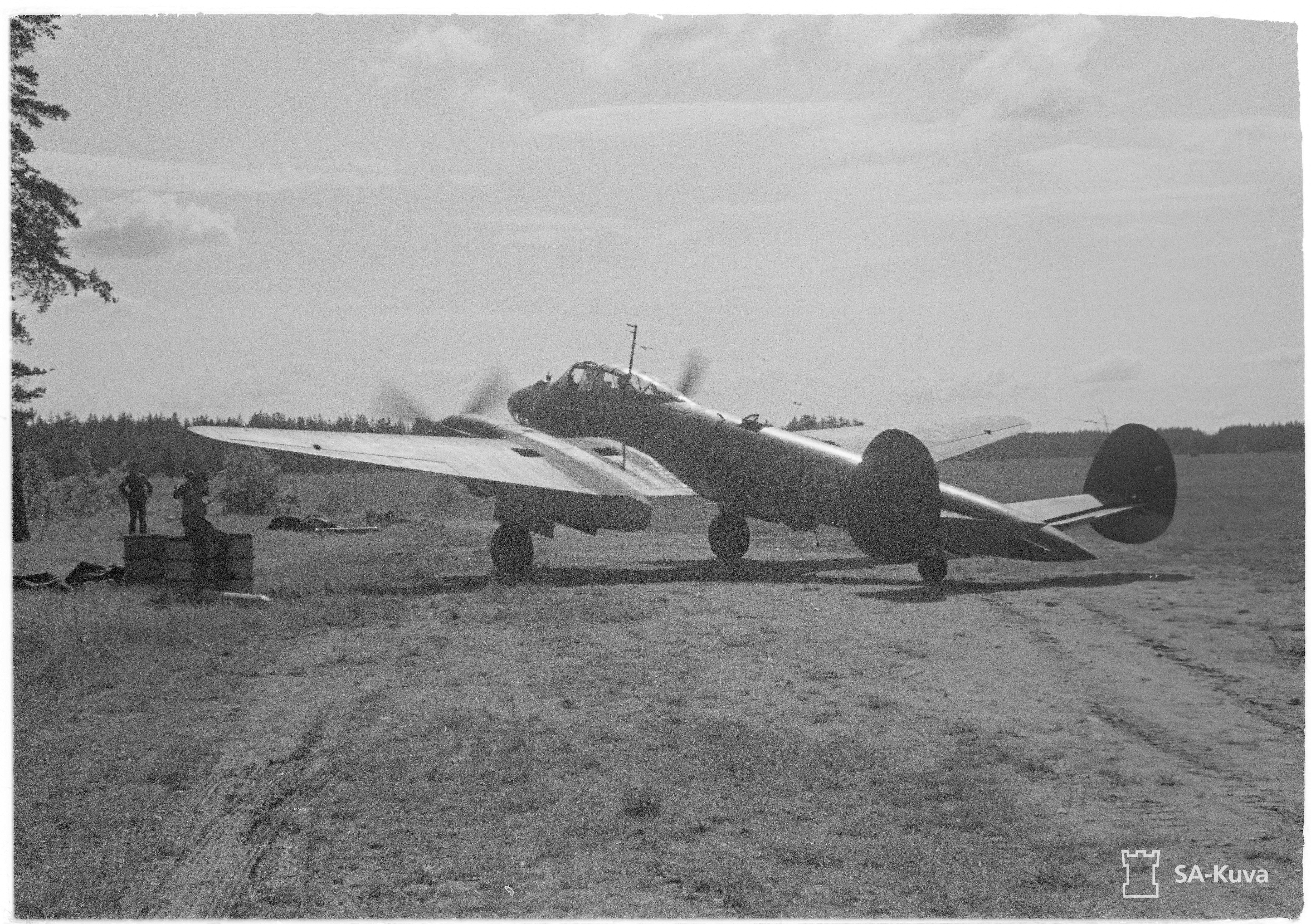 Tiedustelulentäjät saapuvat vaaralliselta, mutta onnistuneelta tiedustelumatkalta. (Kuvassa on pommituslentolaivue 48:n Petljakov Pe-2 syöksypommikone (tunnus PE-215).) Kuvauspaikka: Lappeenranta.